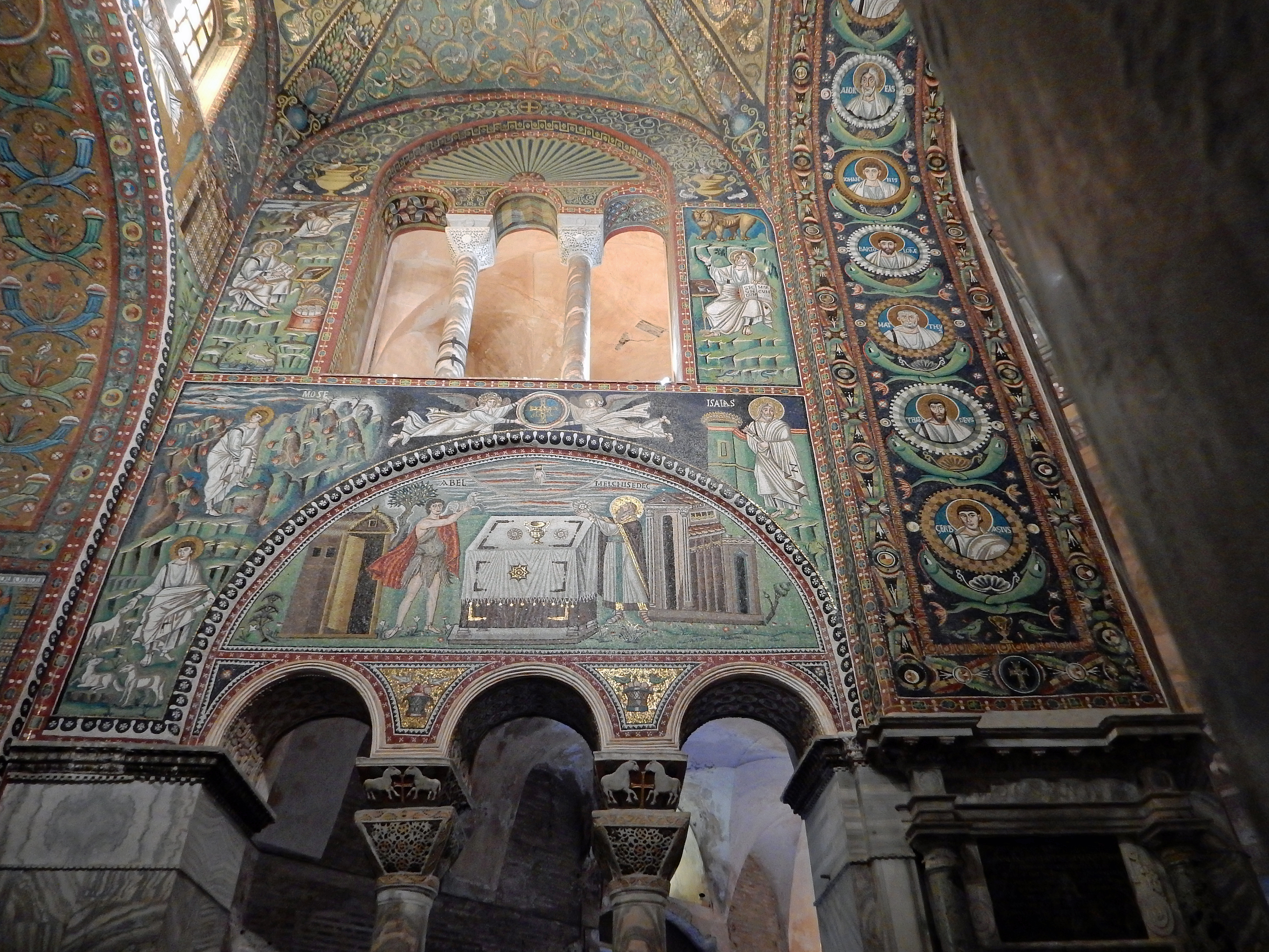 Choeur, paroi sud, avec Abel et Melchisédech